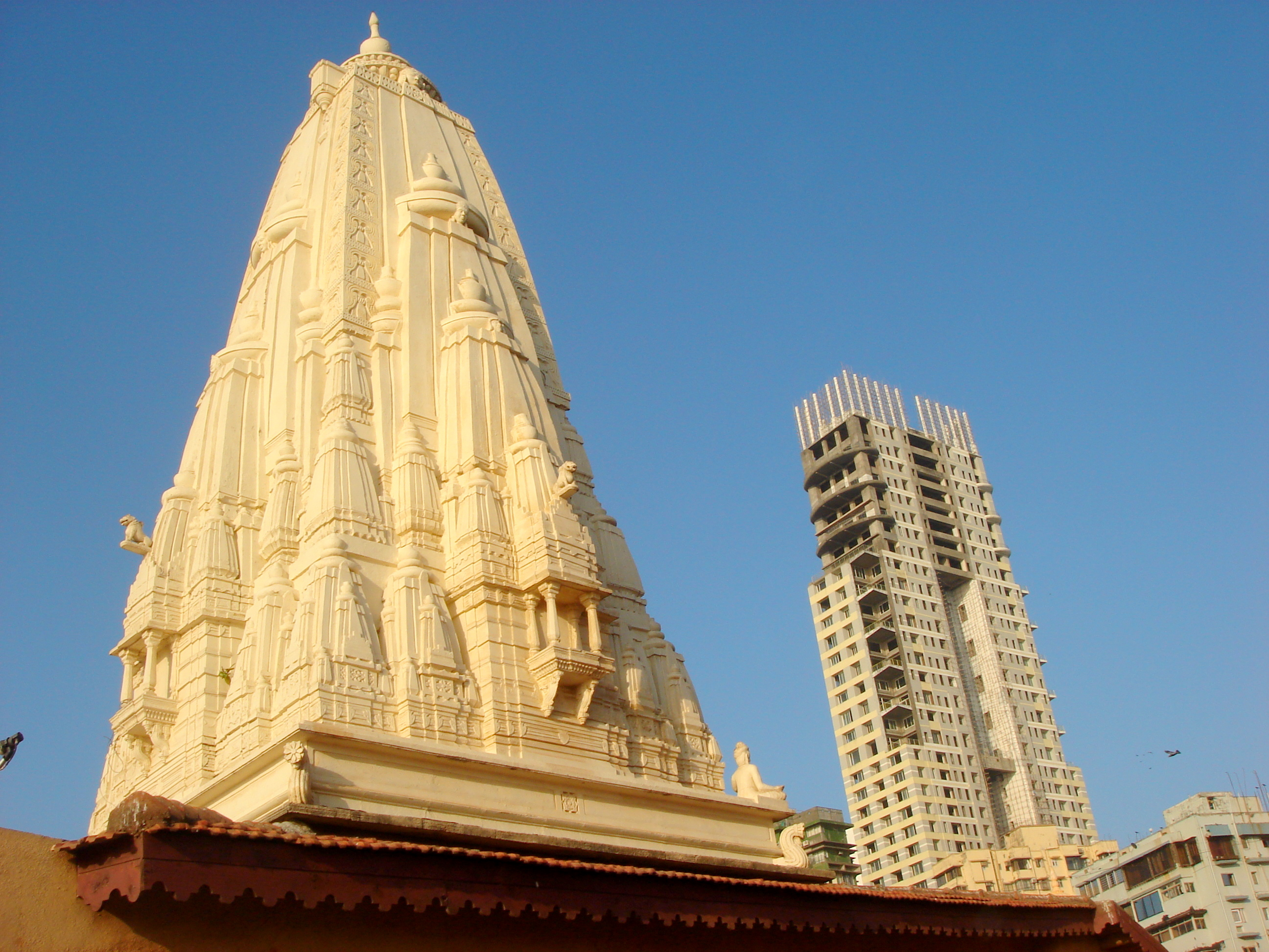 Banganga temple